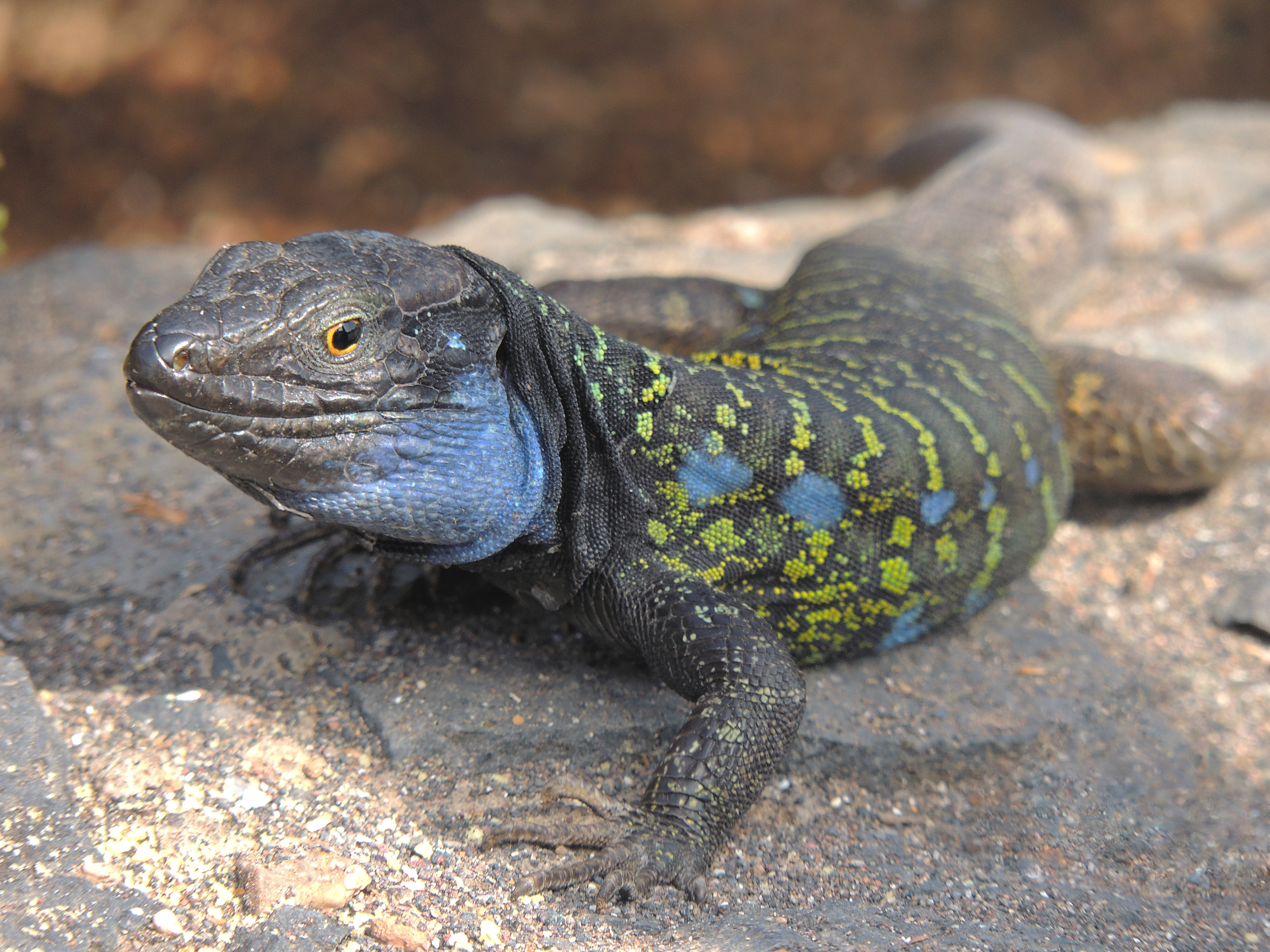 Tenerife lizard / Western Canaries lizard Kanareneidechse